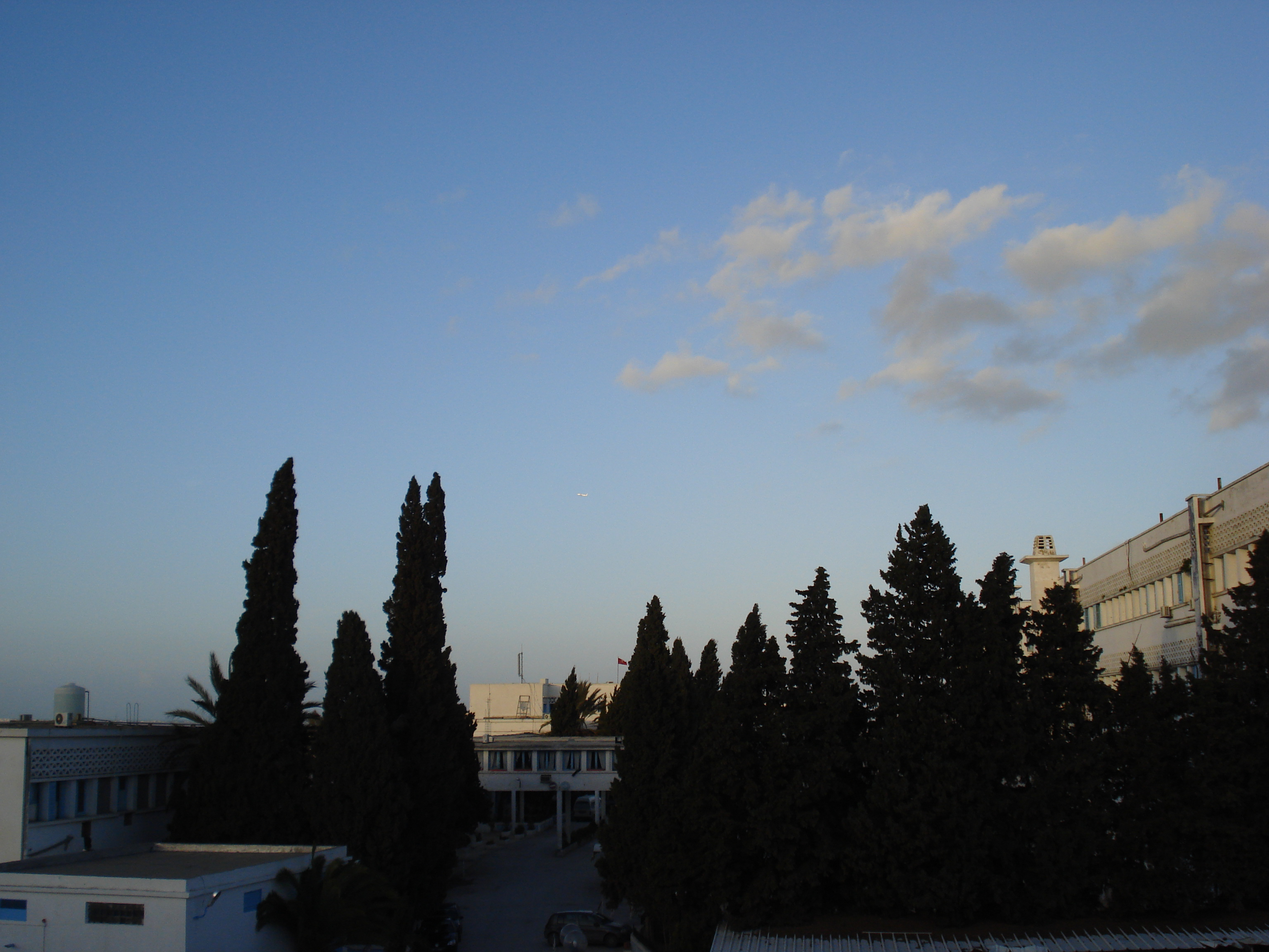 Hôpital Abderrahmen Mami de pneumo-phtisiologie, L'Ariana, Tunisie